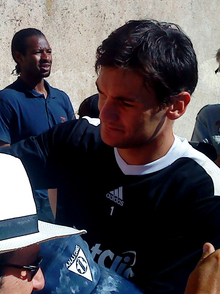 Hugo Lloris à la fin d'un entrainement avec l'Olympique lyonnais